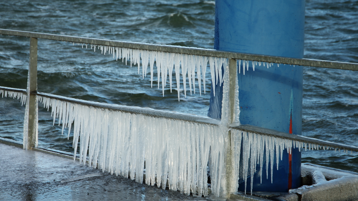 Eiszapfen an Schiffsanleger in Ludorf, Mecklenburg